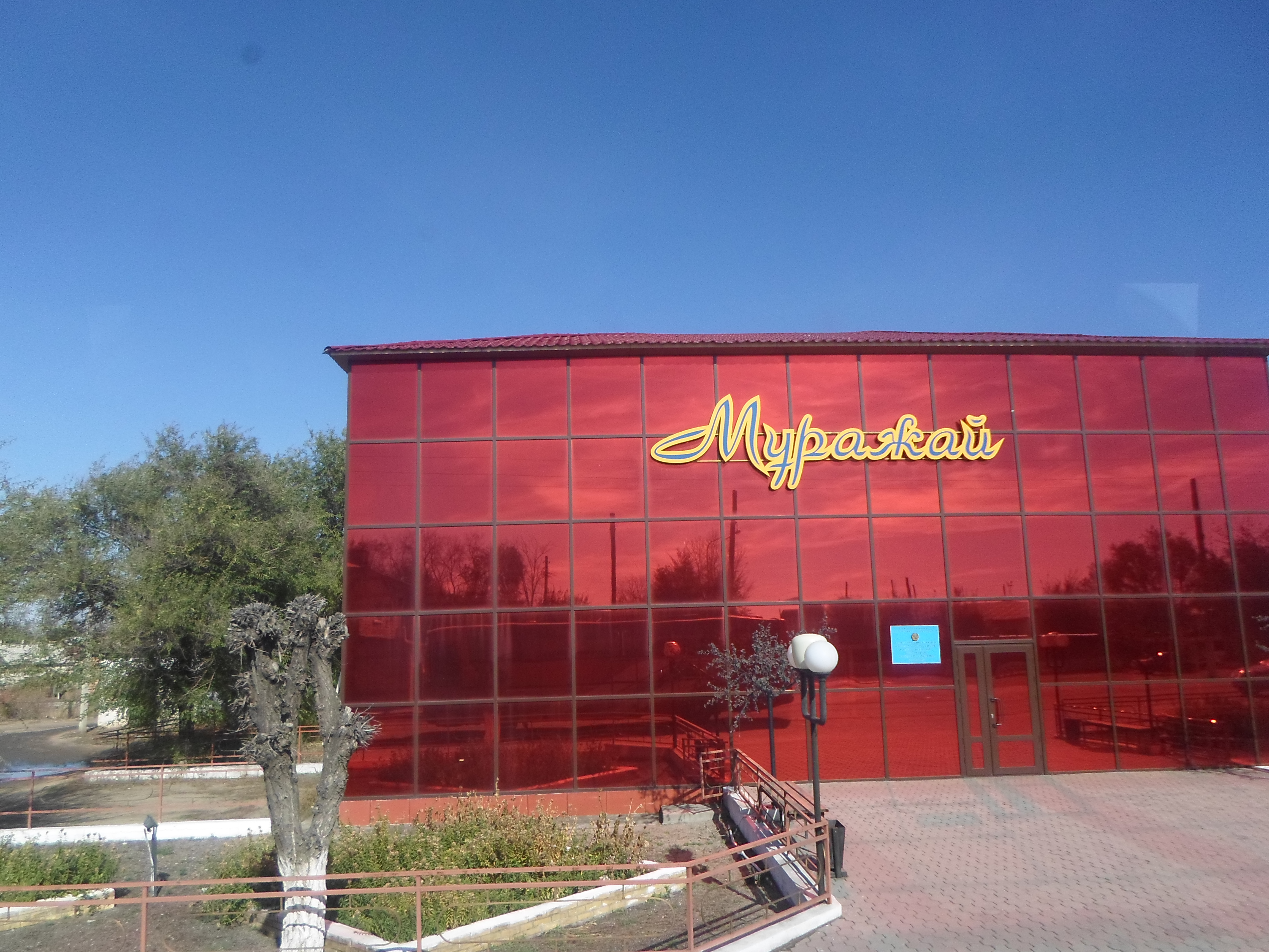 Мұражай